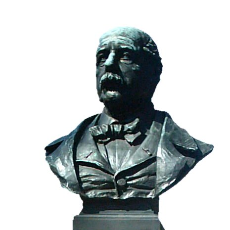 Statue de François Diday dans le Jardin anglais de Genève (Suisse)